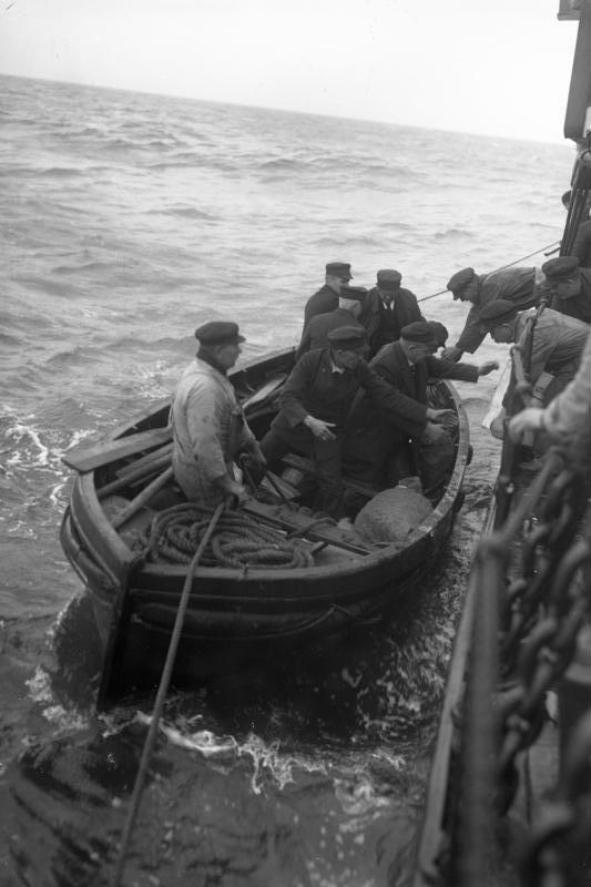 Die gefahrvolle Ablösung und Verproviantierung der staatl. Lotsen auf dem deutschen Feuerschiff "Weser" in der Nordsee. Die ablösende Lotsenmannschaft begibt sich an Bord des Feuerschiffes "Weser".